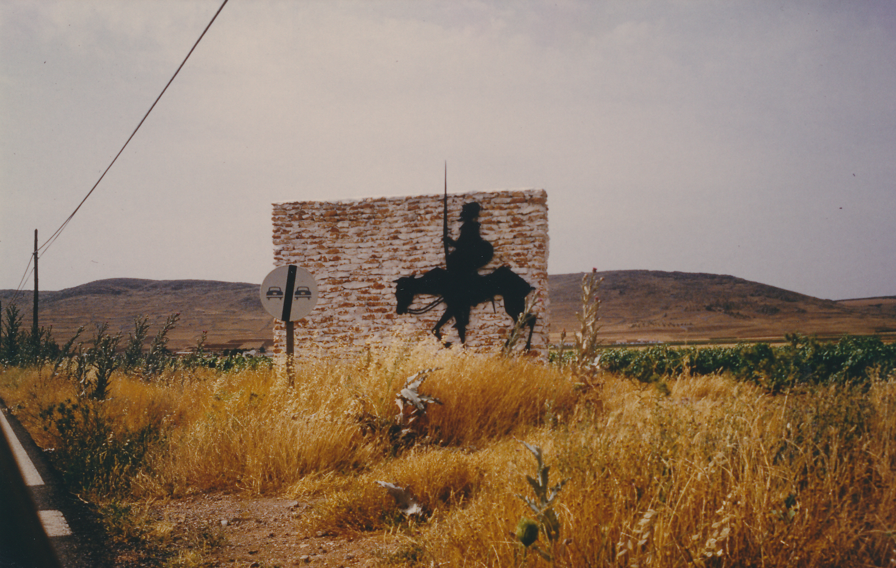 "Don Quijote de la Mancha" (Monument am Straßenrand) Datum: 09/1984 Urheber: Michael Pfeiffer alias Benutzer:Gordito1869 Quelle: privates Fotoalbum des Urhebers